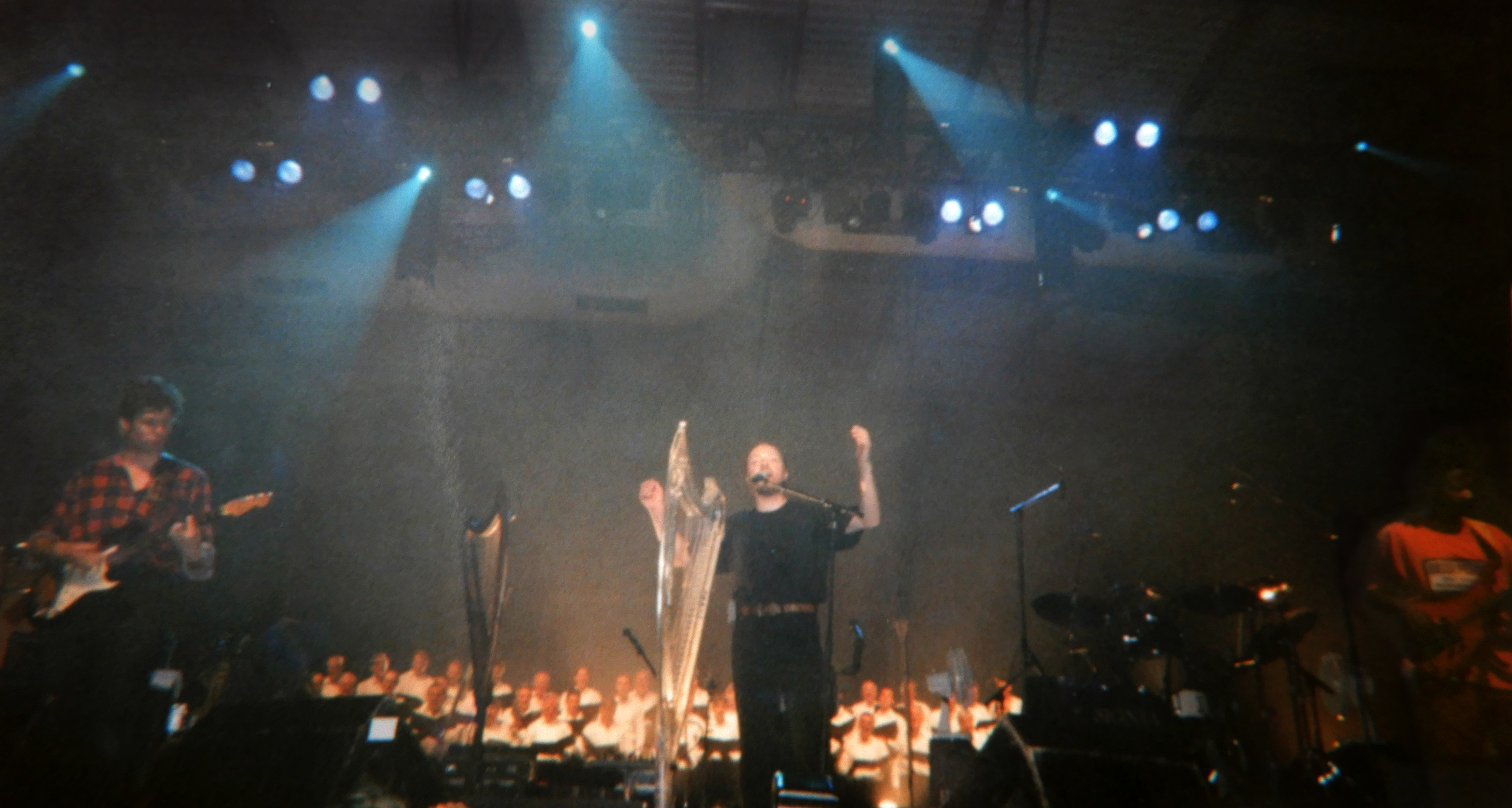 Alan Stivell en concert dans le cadre de la tournée Brian Boru le 12 août 1995 au Festival interceltique de Lorient (parc des expositions de Lann Sevelin).